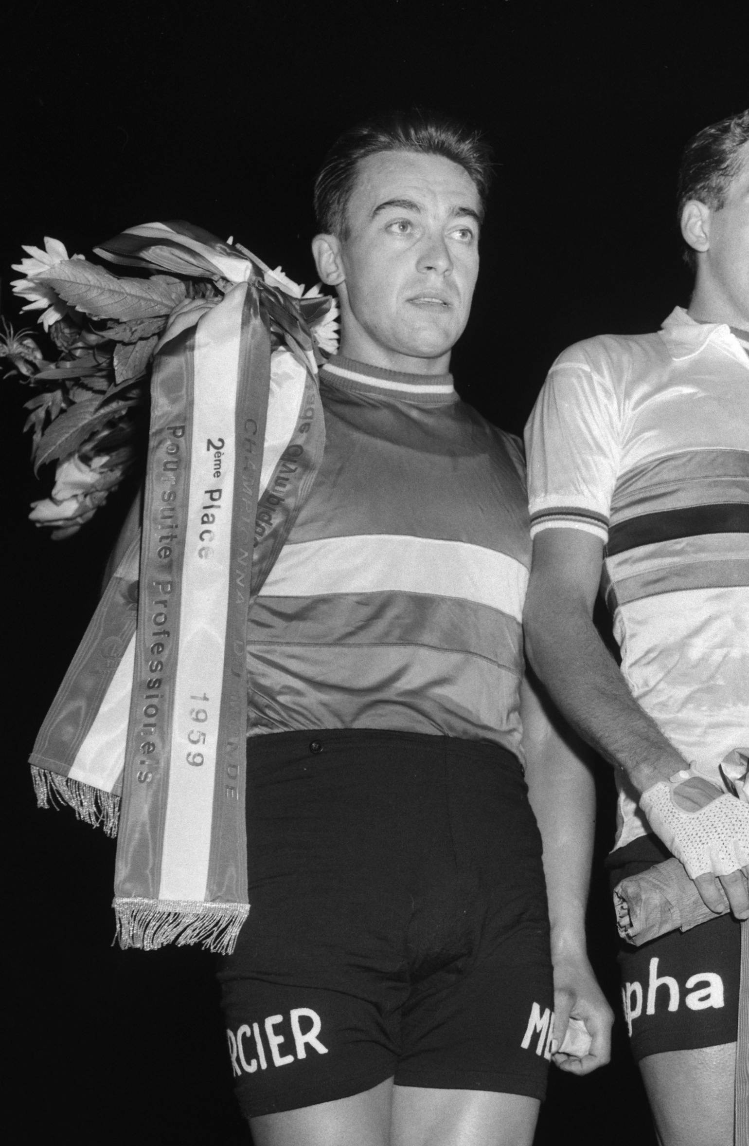 Wereldkampioenschap wielrennen op de baan in Amsterdam. Albert Bouvet